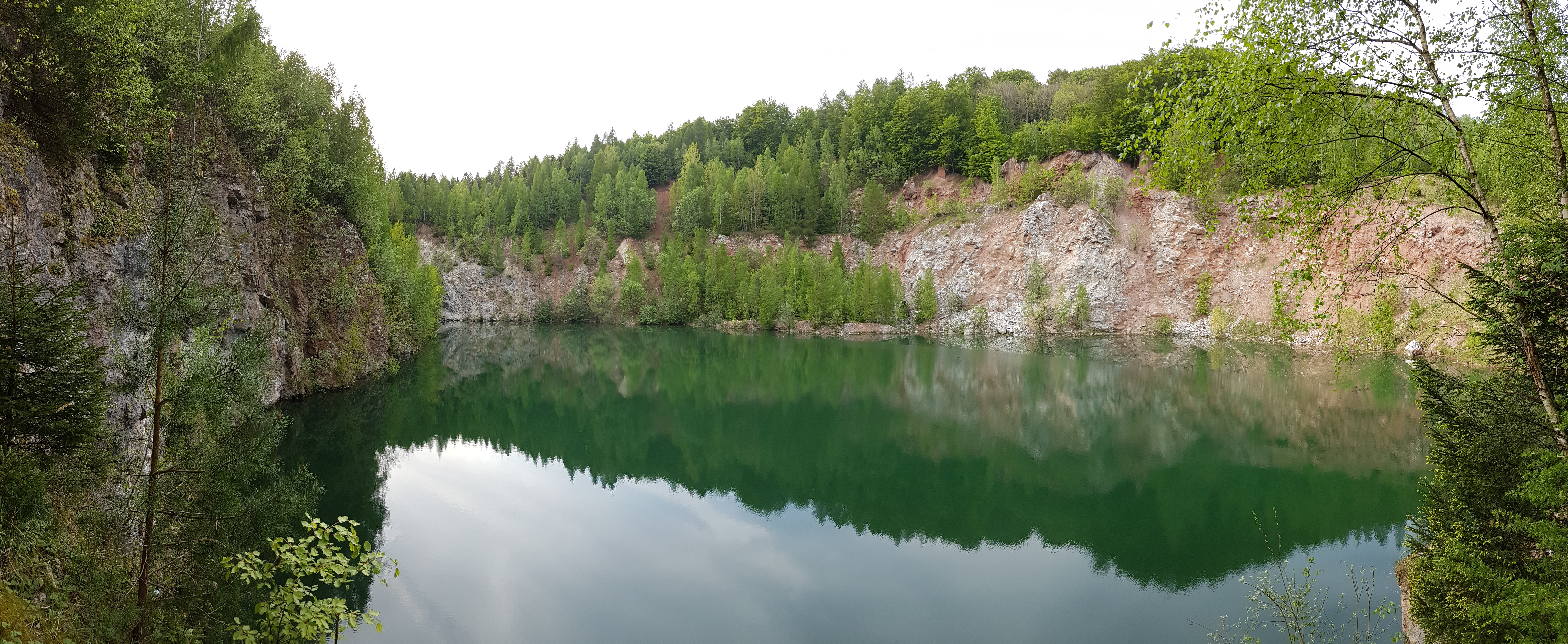 Auf dem Bild zu sehen, der Ausblick aus dem Wald über den Kathagensee in Stadtoldendorf; Bereich im EU-Vogelschutzgebiet DE-4022-431 „Sollingvorland“.